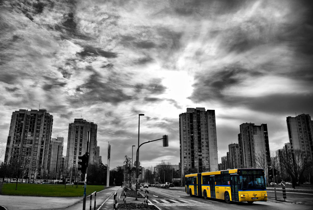 Novi Beograd